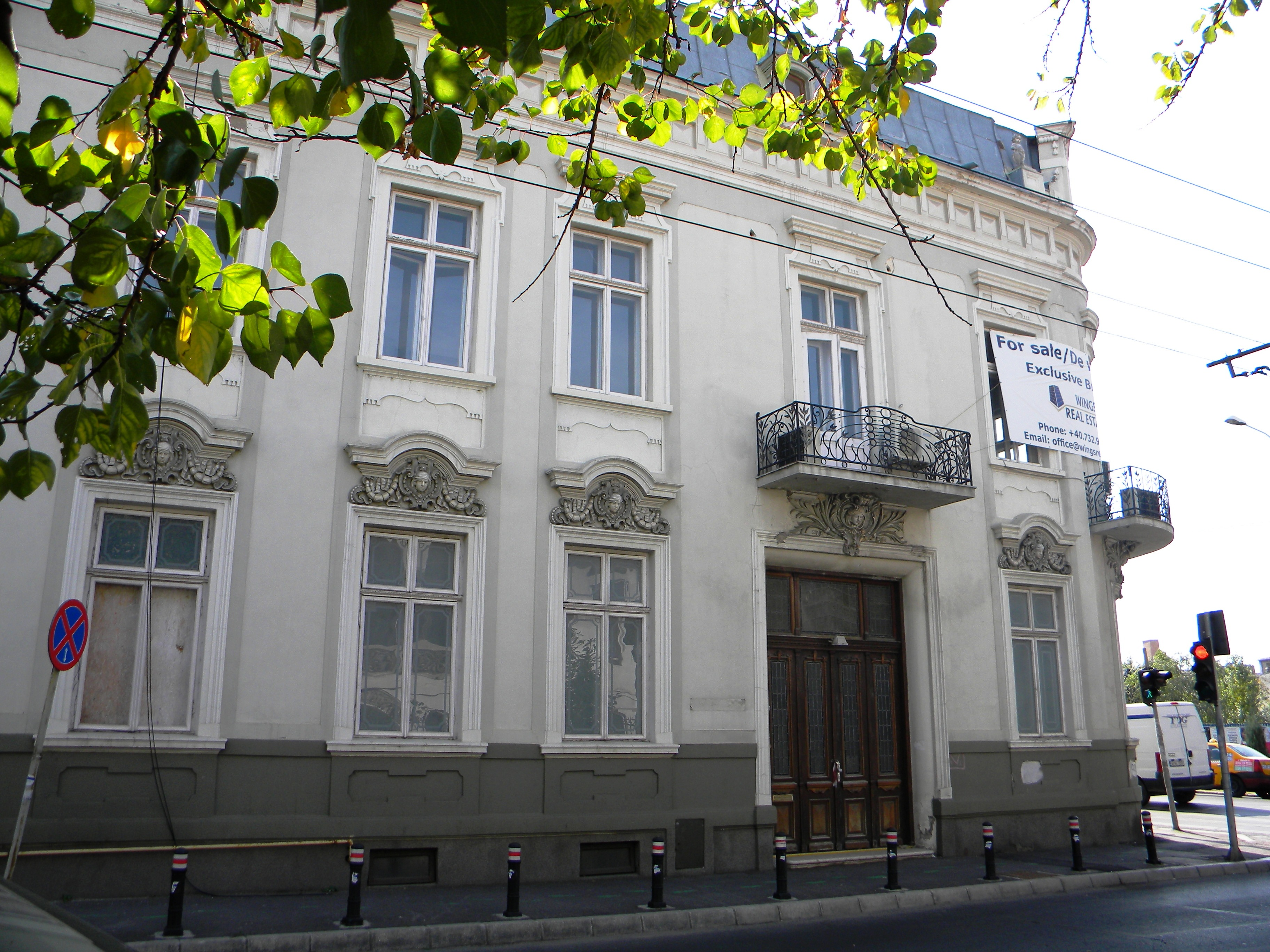 Bucuresti, Romania, Casa DR. Tomescu nr. 17 pe Str. Gh. Manu colt cu Calea Victiriei, sect. 1